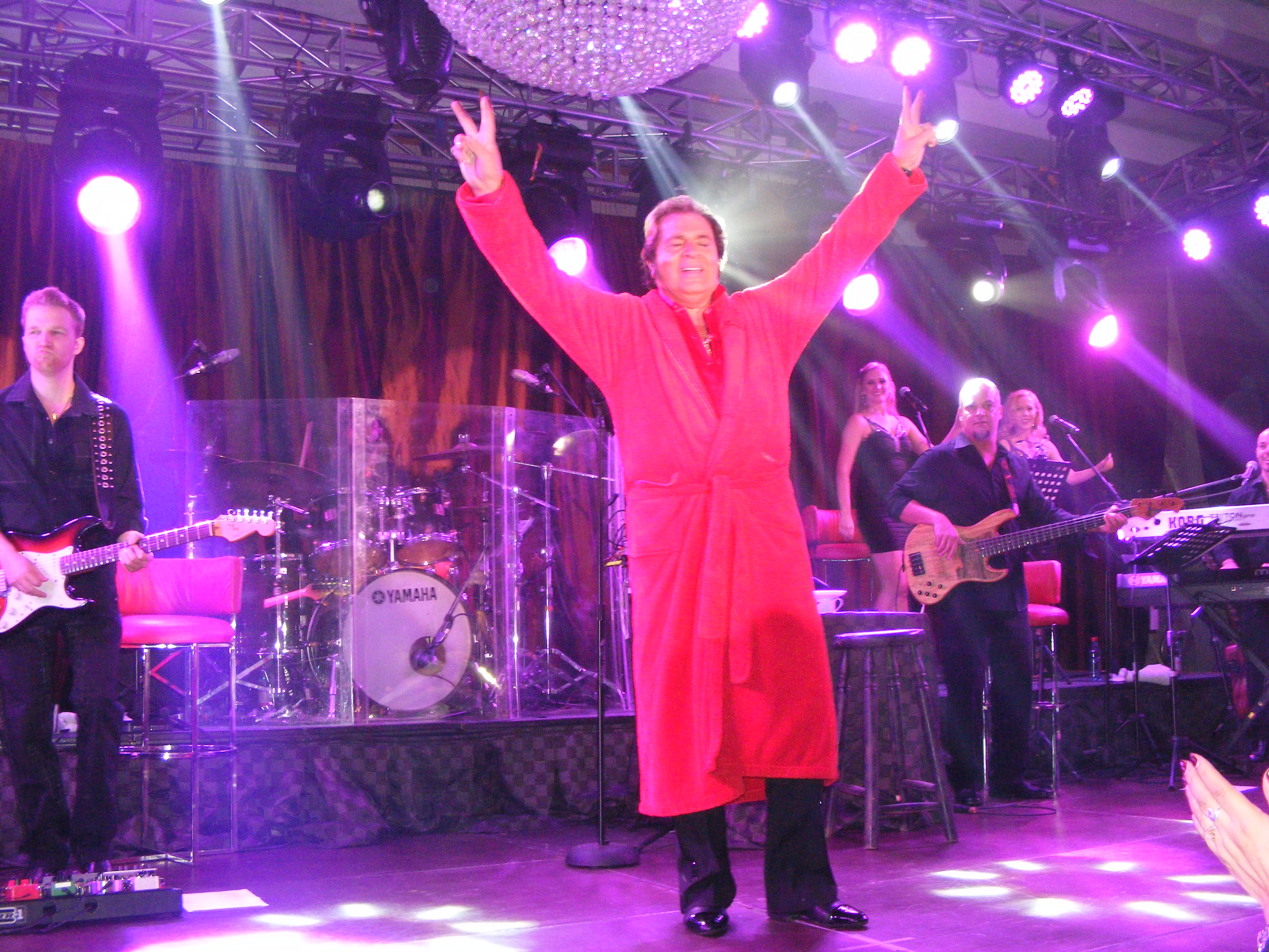 Final concierto Casino Monticello Rancagüa Chile 2015.